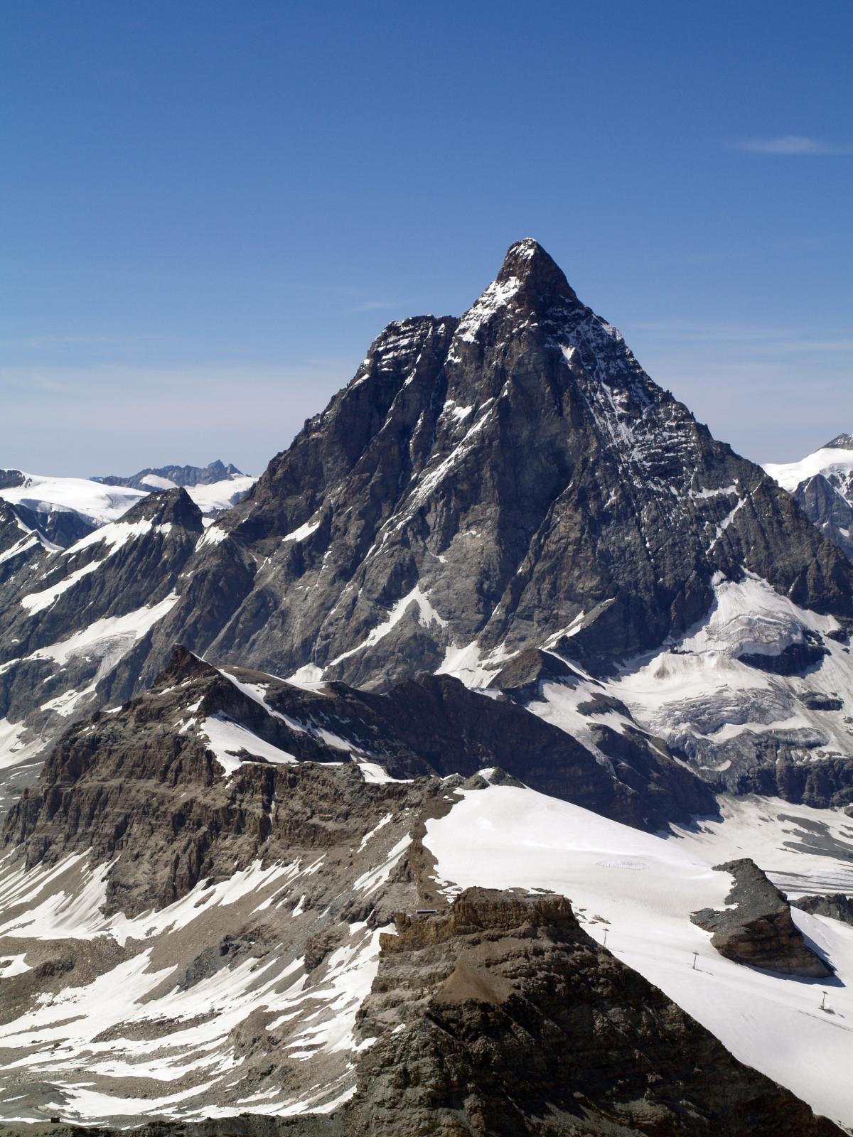 Matterhorn (4478m) from Klein Matterhorn